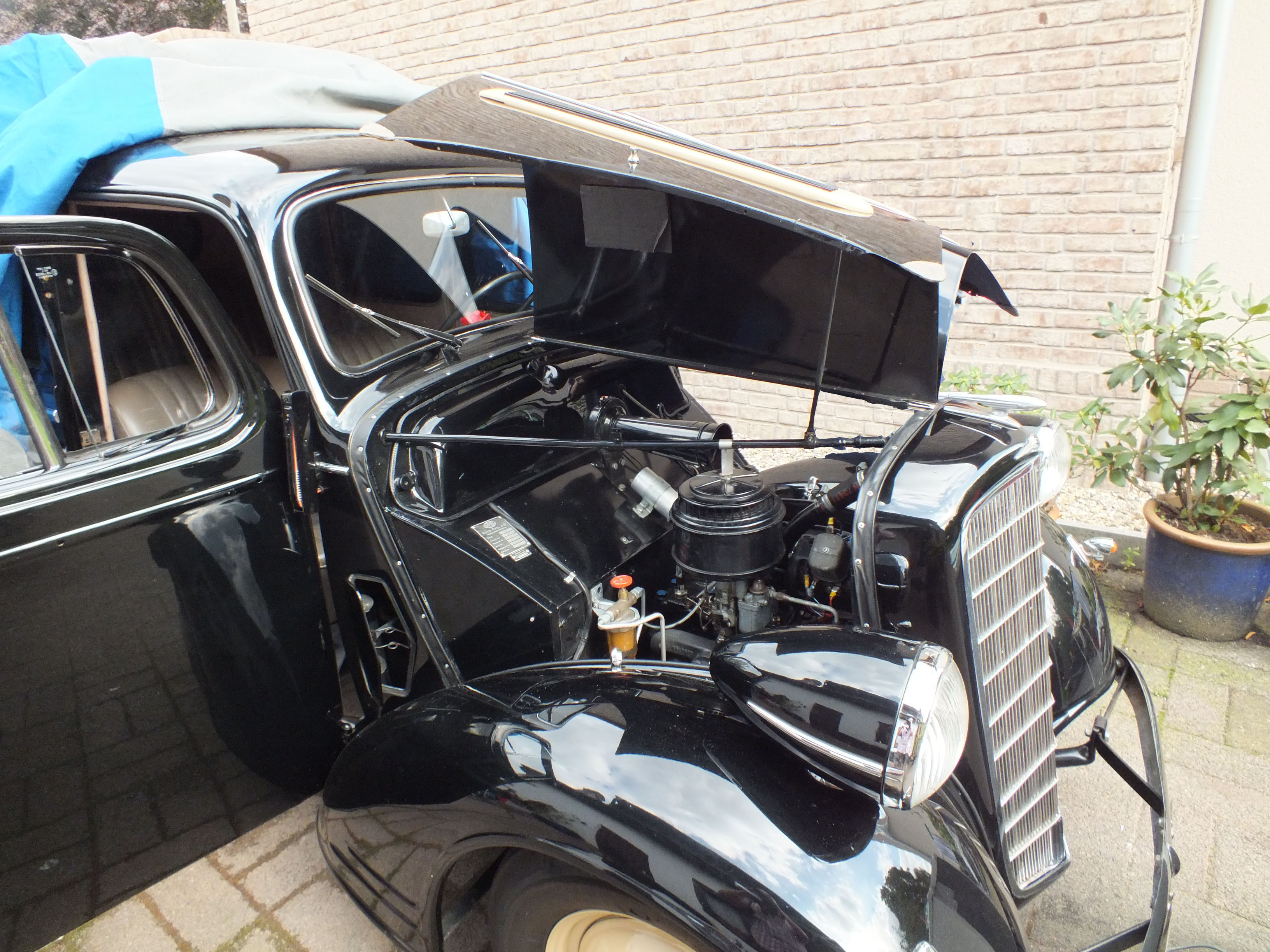 Opel 1,3 Liter Front